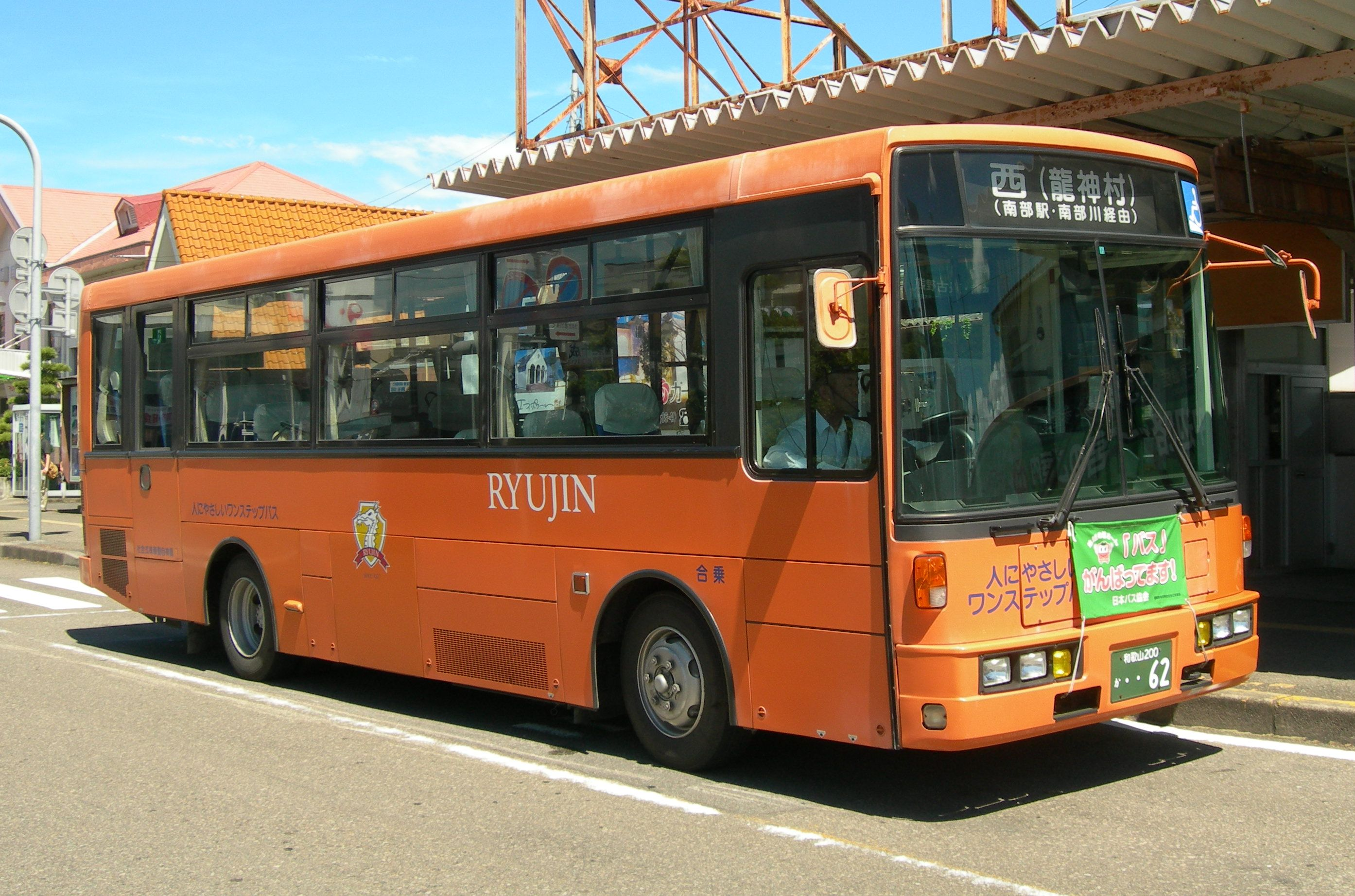 龍神自動車・路線バス